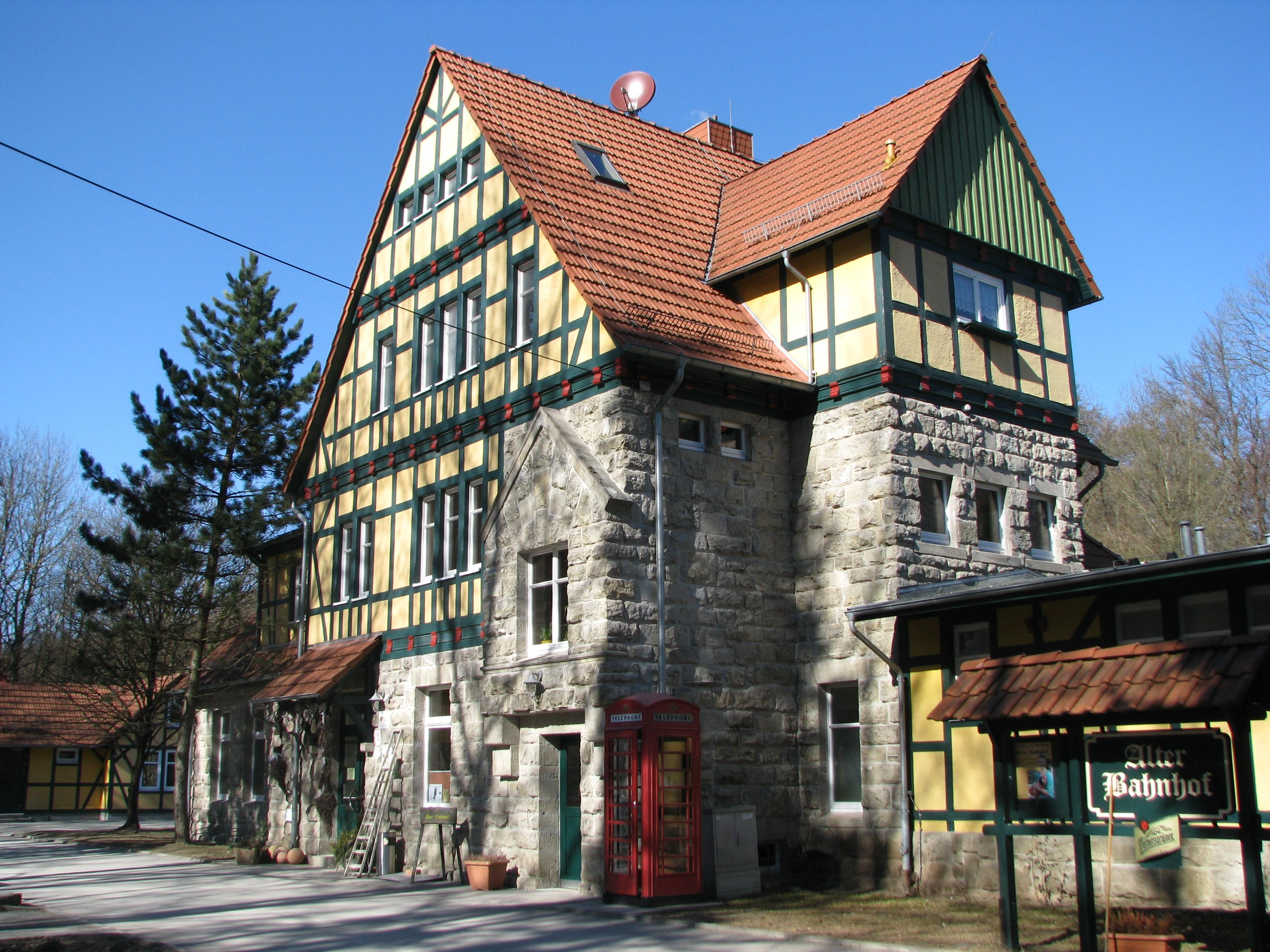 Der Alte Bahnhof östlich von Heyerode am Hainich.